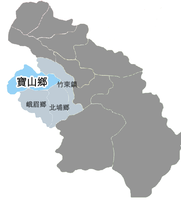 寶山鄉相對位置。